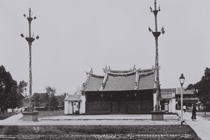 foto. Chinese tempel in Palembang, South Sumatra, probably today's Chandra Nadi Temple